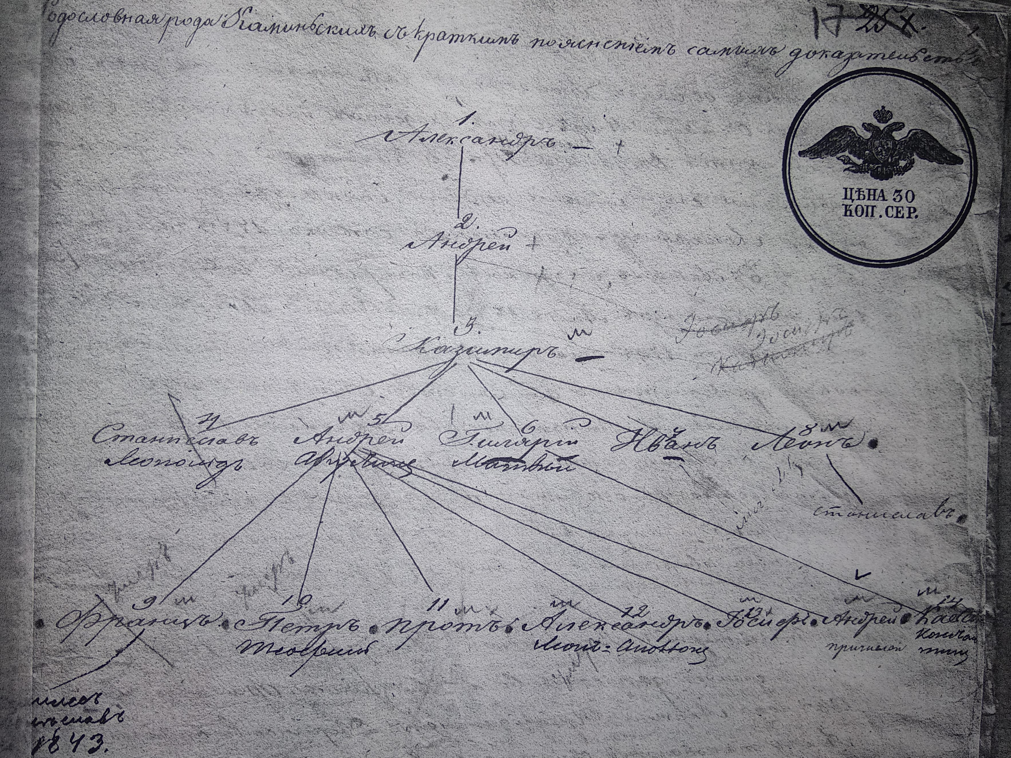 Данная схема указана в родословной Каминских из Государственного архива украины Житомирской области, ф. 146, оп. 1, дело 2701, л. 17.